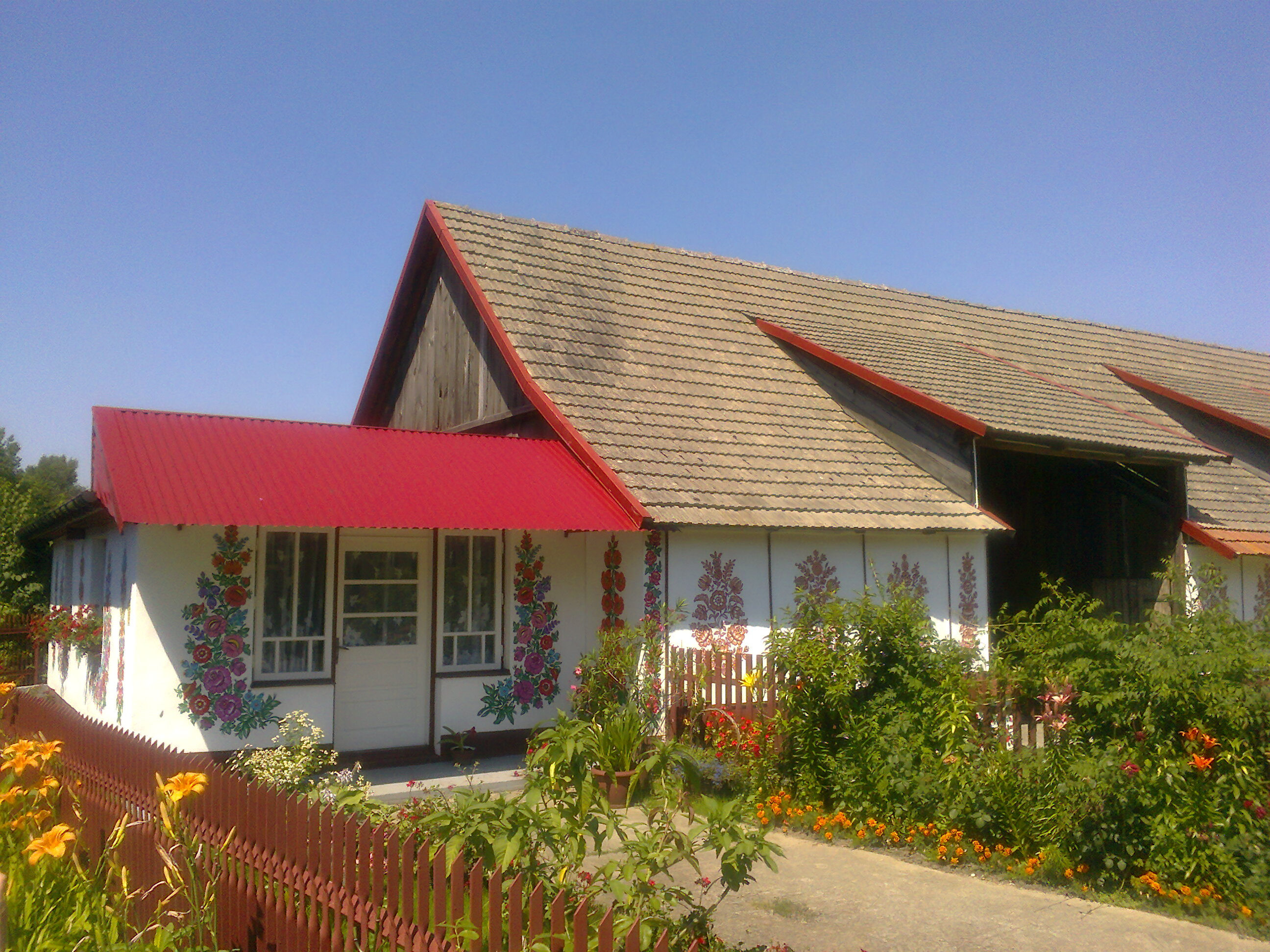 Zalipie